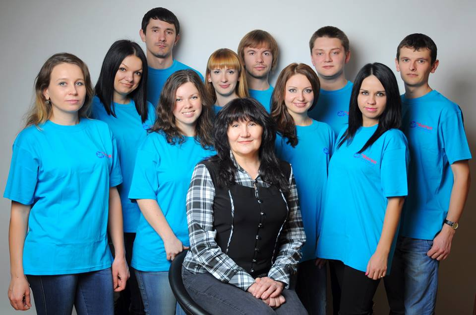 Волонтери фонду "Ти-Ангел"